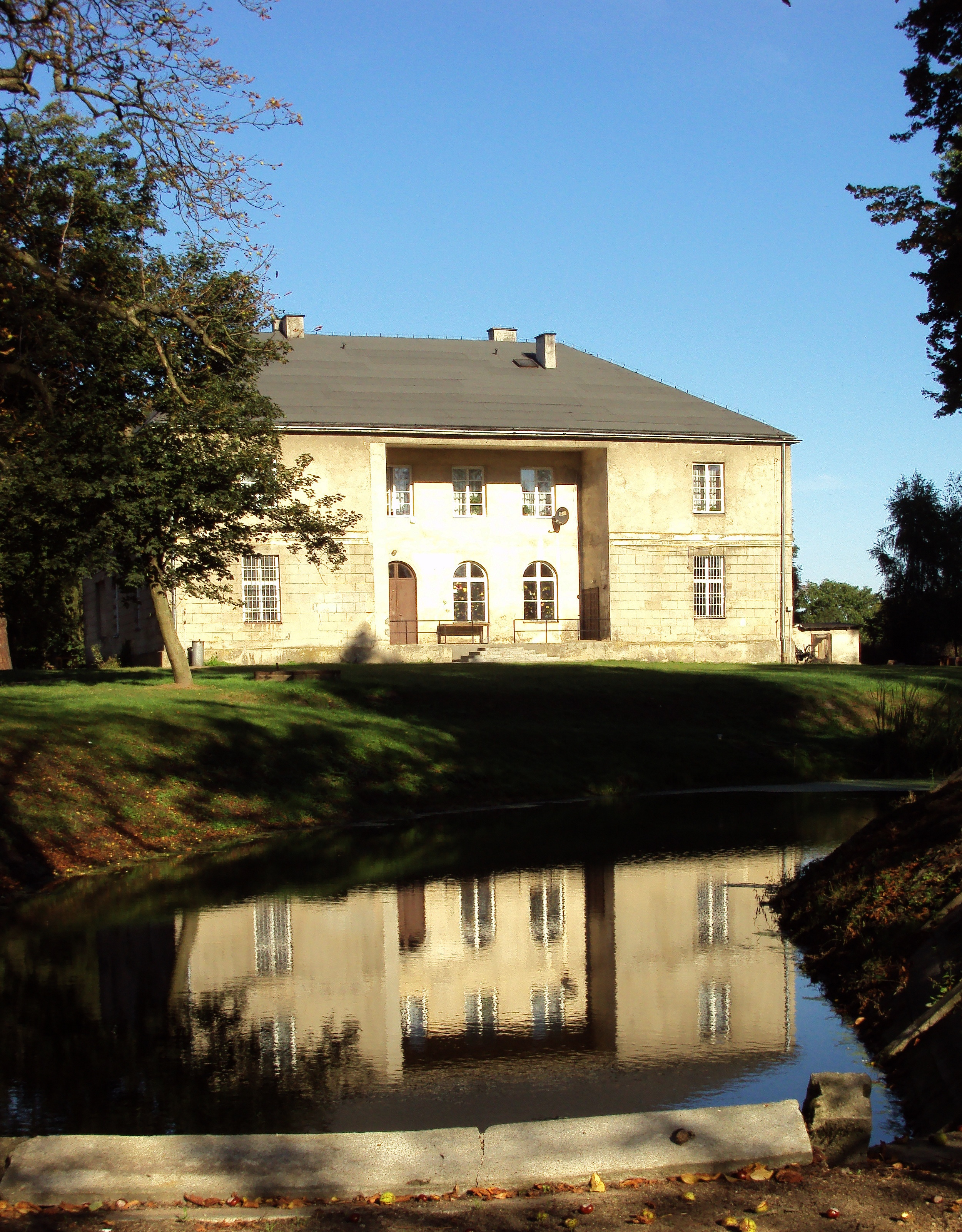 zespół pałacowy: pałac, XVIII/XIX Sadłowo